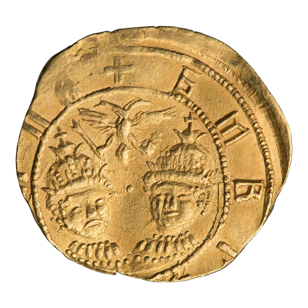 Угорский 1692 г. (реверс). ГМ 8.I.8—10.I.10; Биткин II 92.5.В. Погрудное изображение юных царей Ивана и Петра в царских венцах и облачении. Наверху, между головами, двуглавый орёл без корон. Круговая надпись: + Б М В Г [ Ц Ï К Ï А ] П А (БОЖИЕЙ МИЛОСТИЮ ВЕЛИКИЕ ГОСУДАРИ ЦАРИ И КНЯЗИ ИОАНН АЛЕКСЕЕВИЧ ПЕТР АЛЕКСЕЕВИЧ)